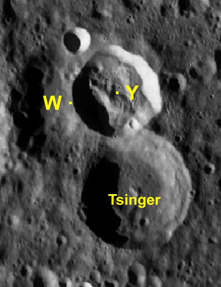 Cráter lunar Tsinger. Cráteres satélite. (Imagen LRO)